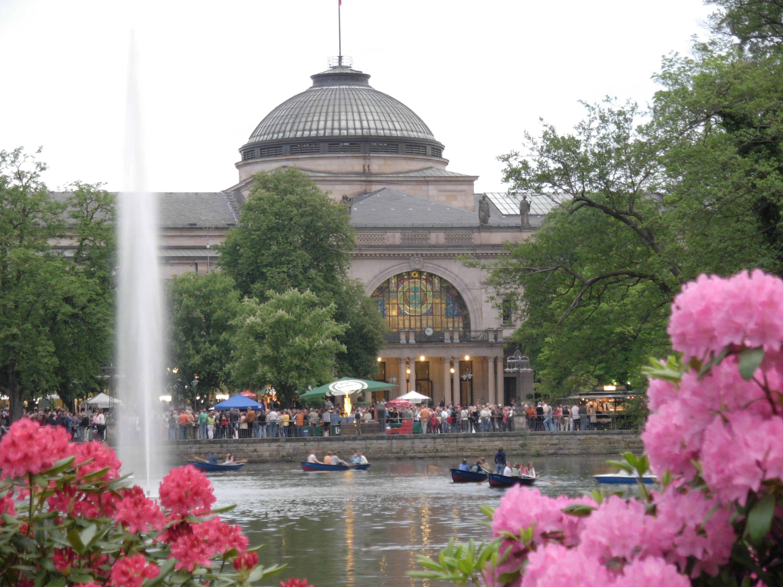 Kurhaus von der Rückseite mit Teich zur 100 Jahres-Feier